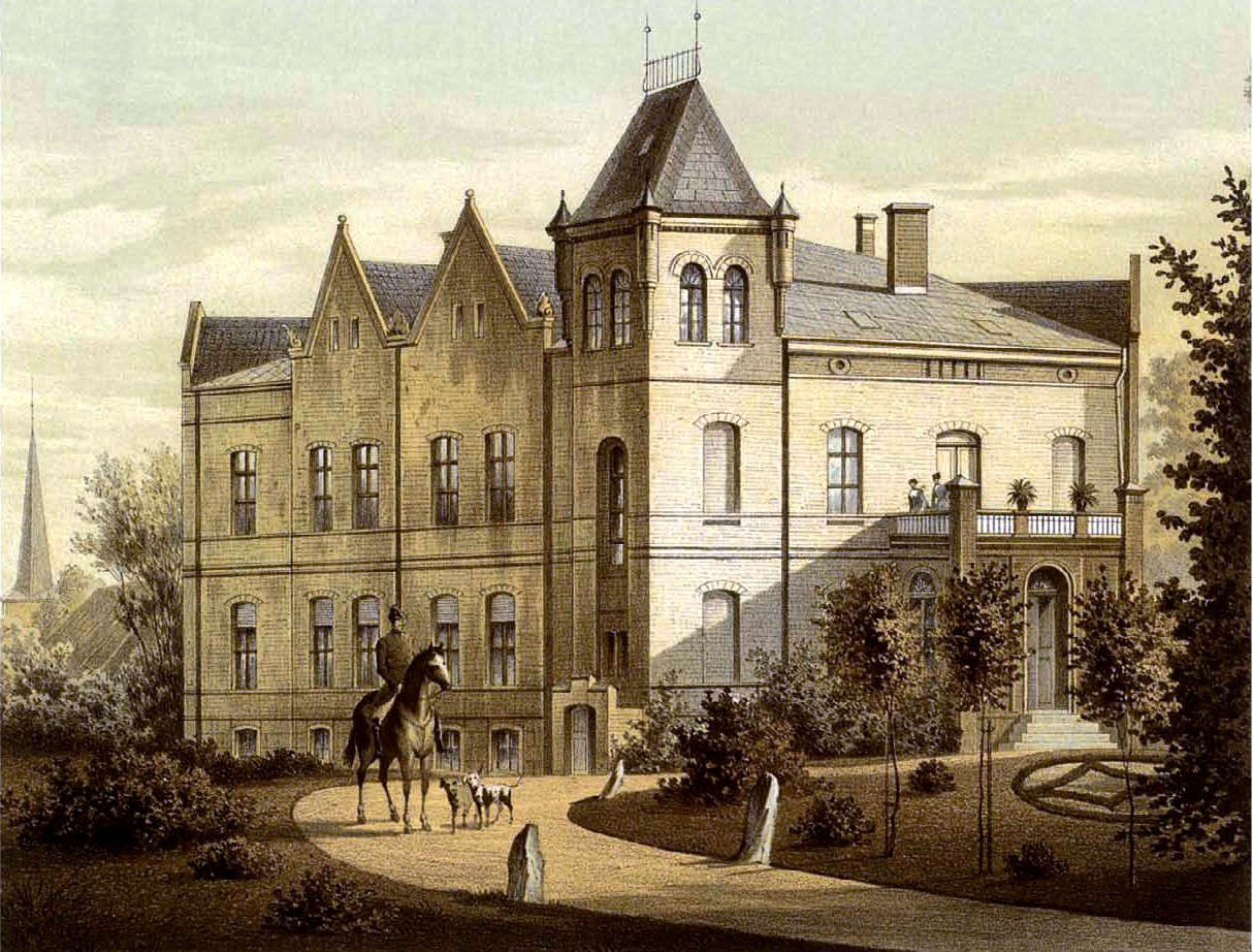 Gut Succow, Kreis Pyritz, Provinz Pommern